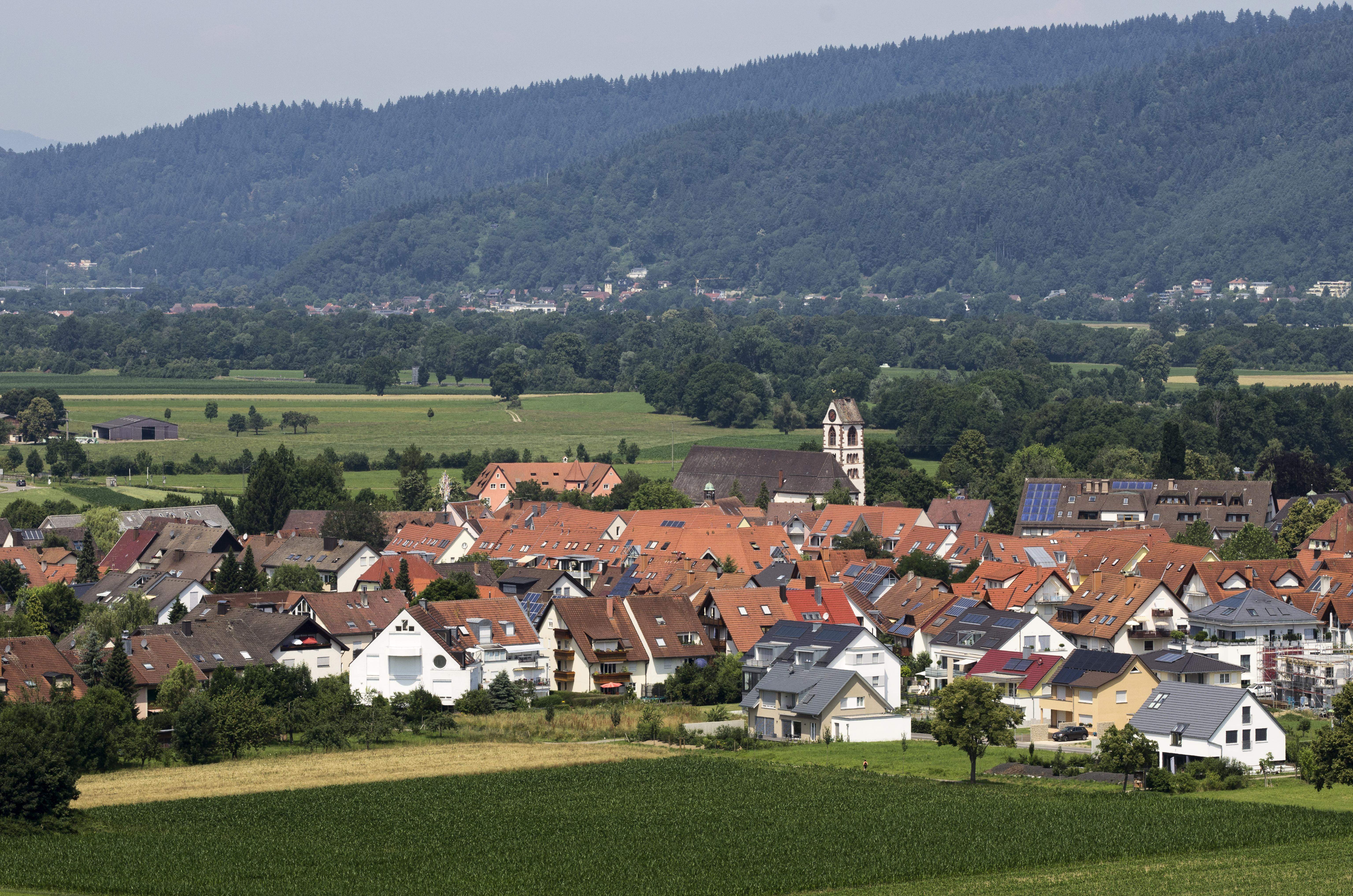 Bilder von der Giersbergkapelle